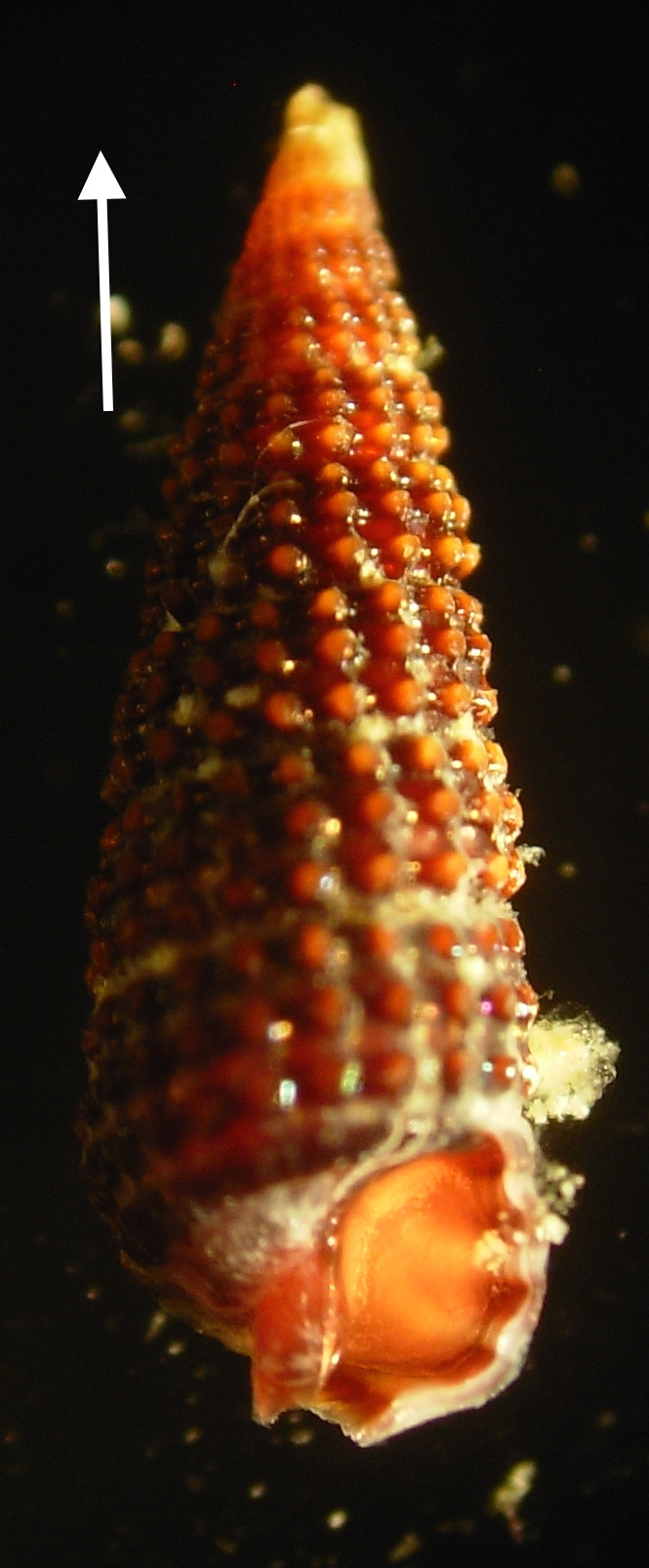 Cerithiopsis tubercularis. Coquille, son ouverture et le canal siphonna. La flèche mesure 1 mm